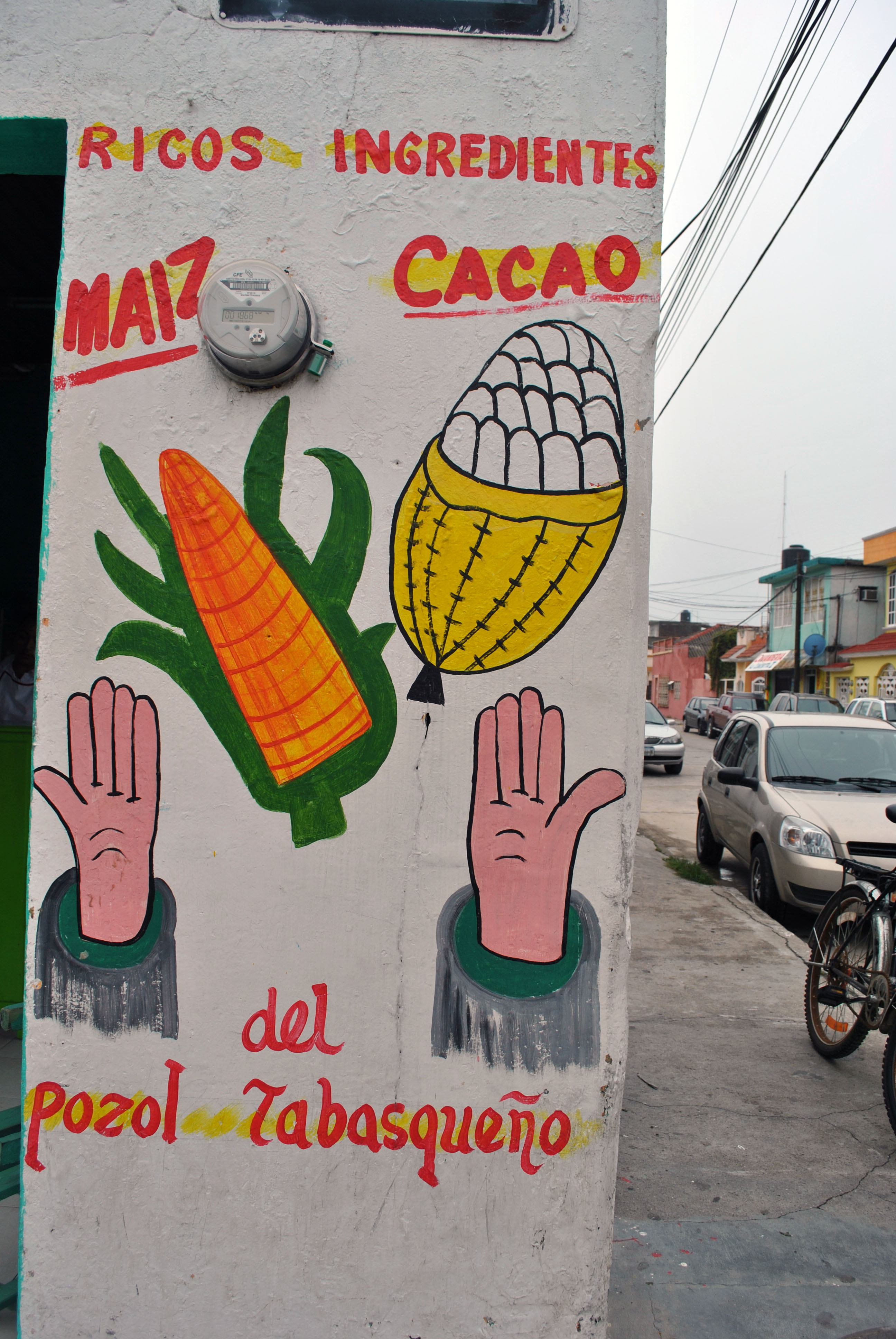 Ilustración pintada en una pozolería de Paraíso, Tabasco.